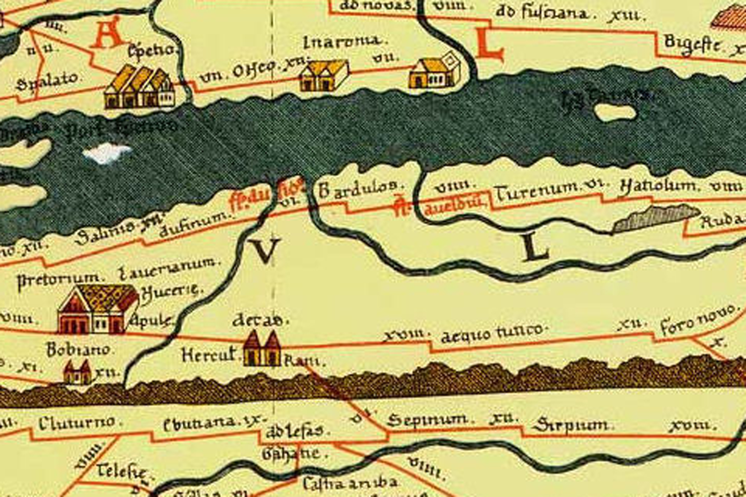 Tavola Peutingeriana: frammento con Bardulos